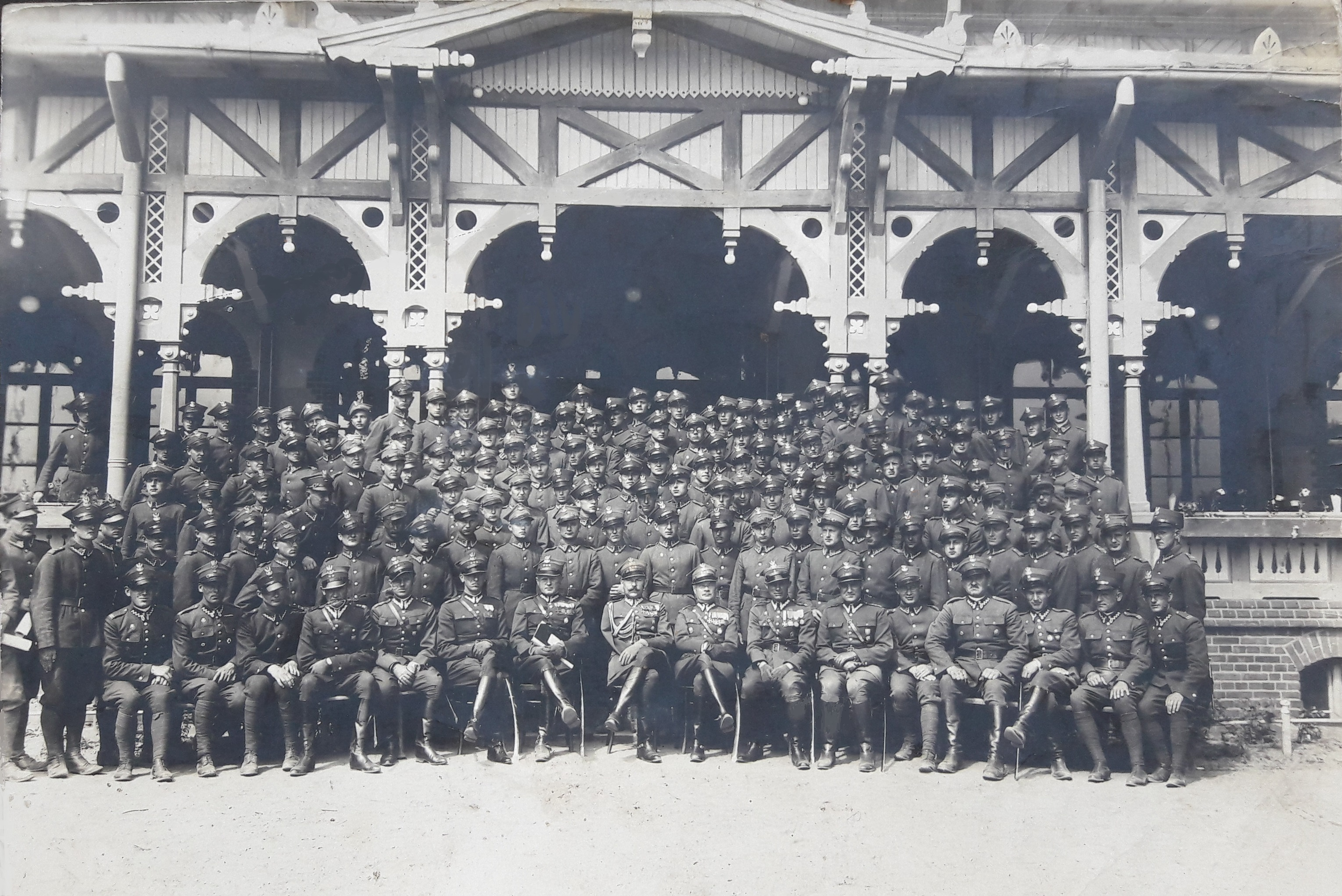 Biedrusko - fotografia grupowa żołnierzy 25 DP przed kasynem oficerskim. Pośrodku siedzi płk dypl. Stefan Kossecki, d-ca piechoty dywizyjnej